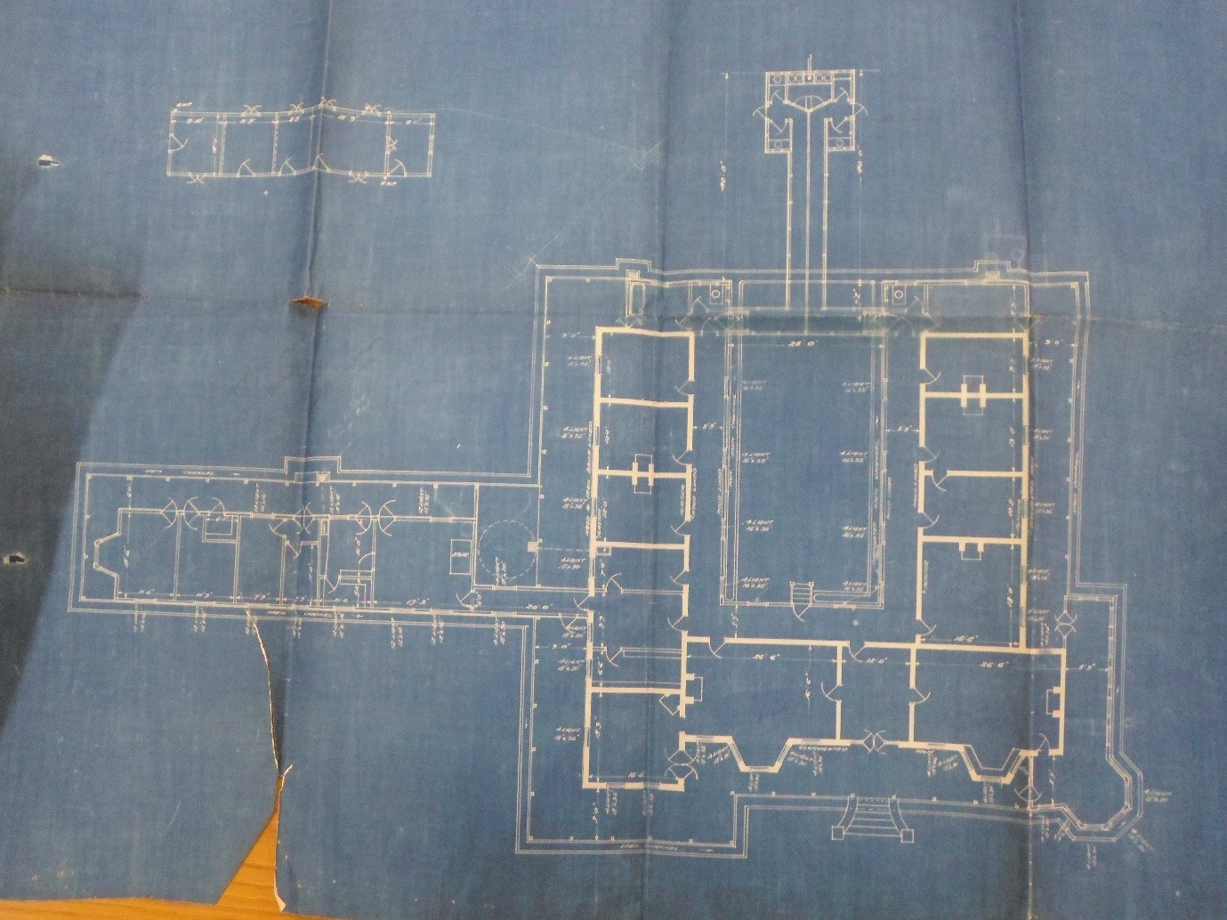 Planne vir sinkhospitaal, circa 1921